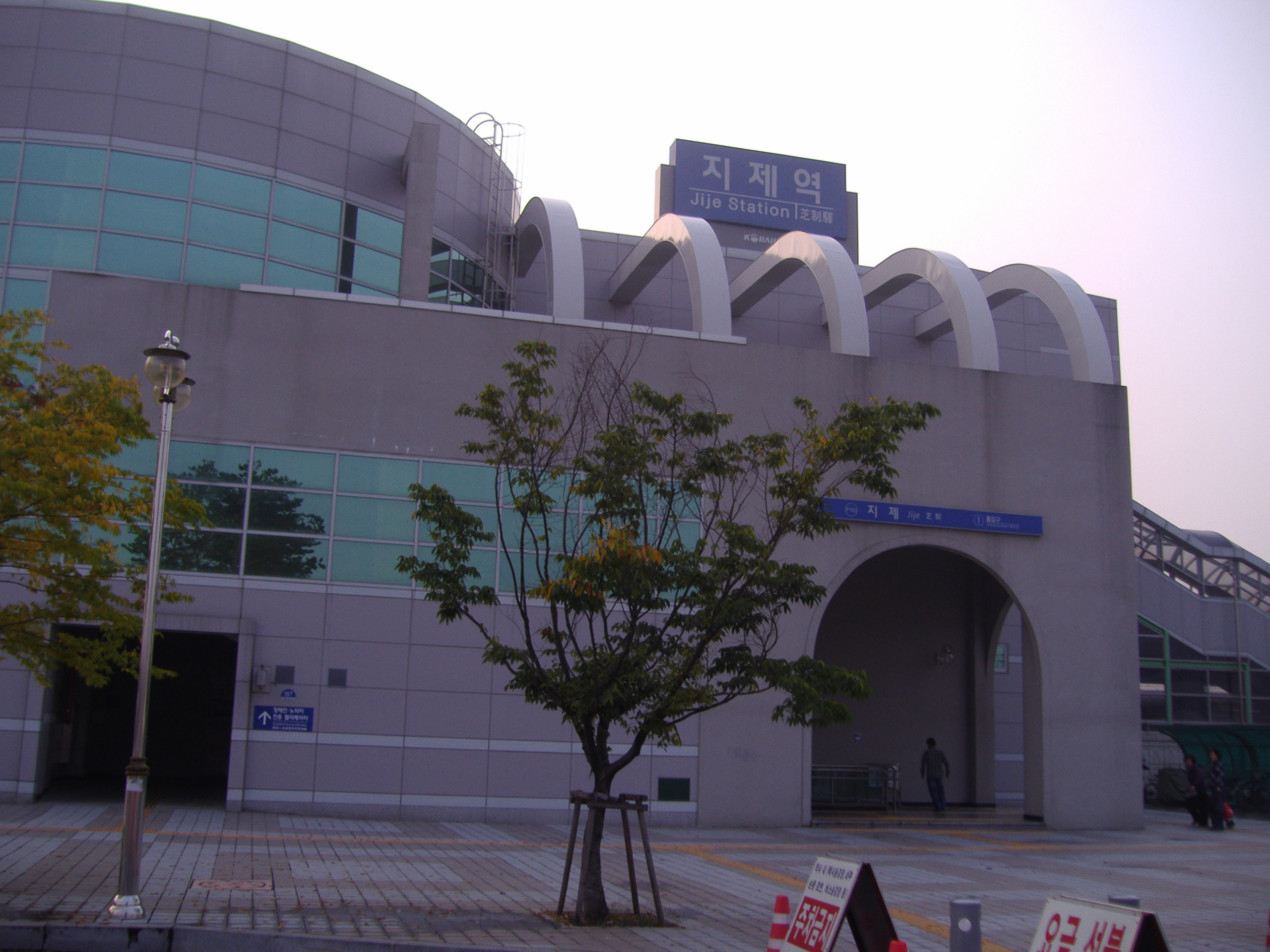 芝制駅 駅舎